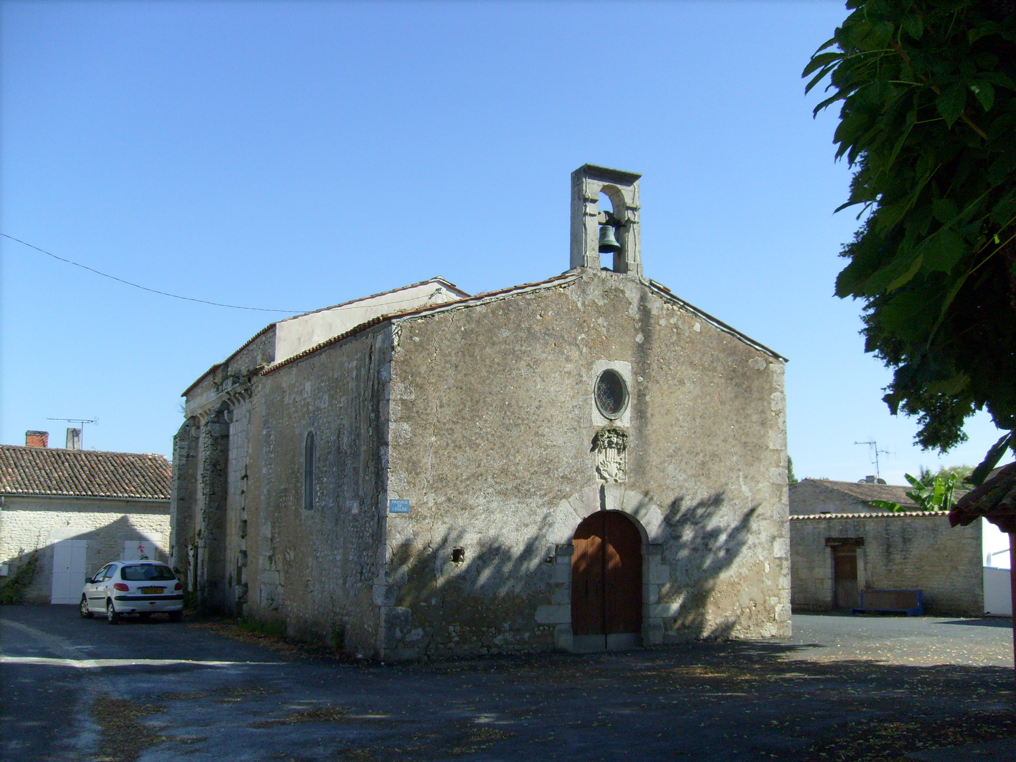 L'église romane de Dercie, commune de Le Gua